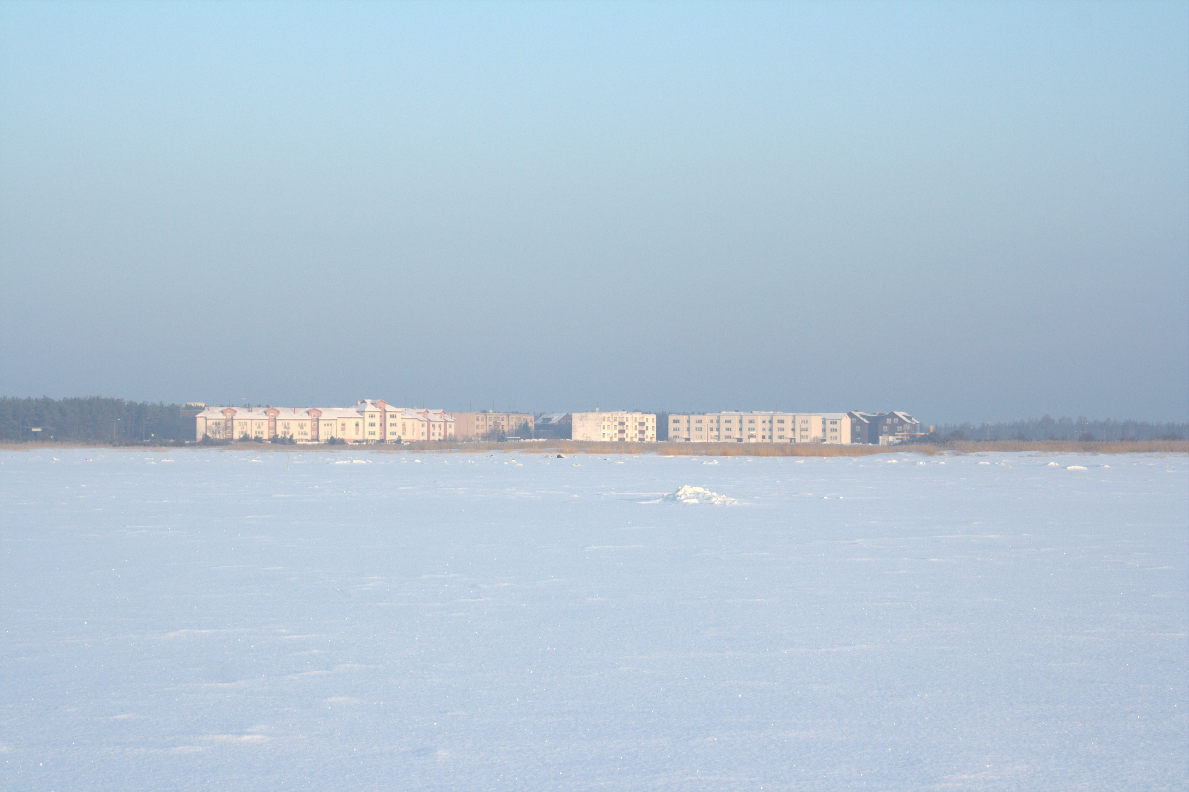 Tuulte Roos